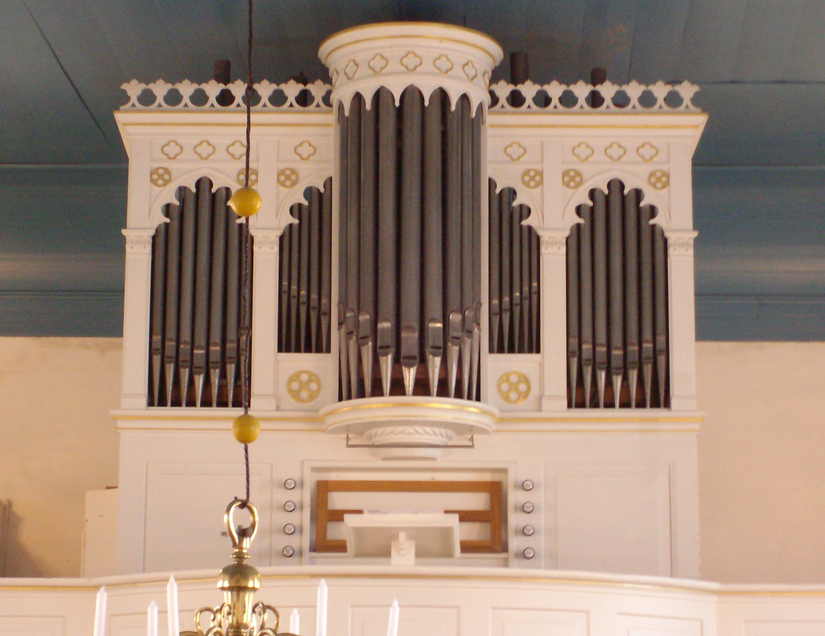 Orgel Holtgaste